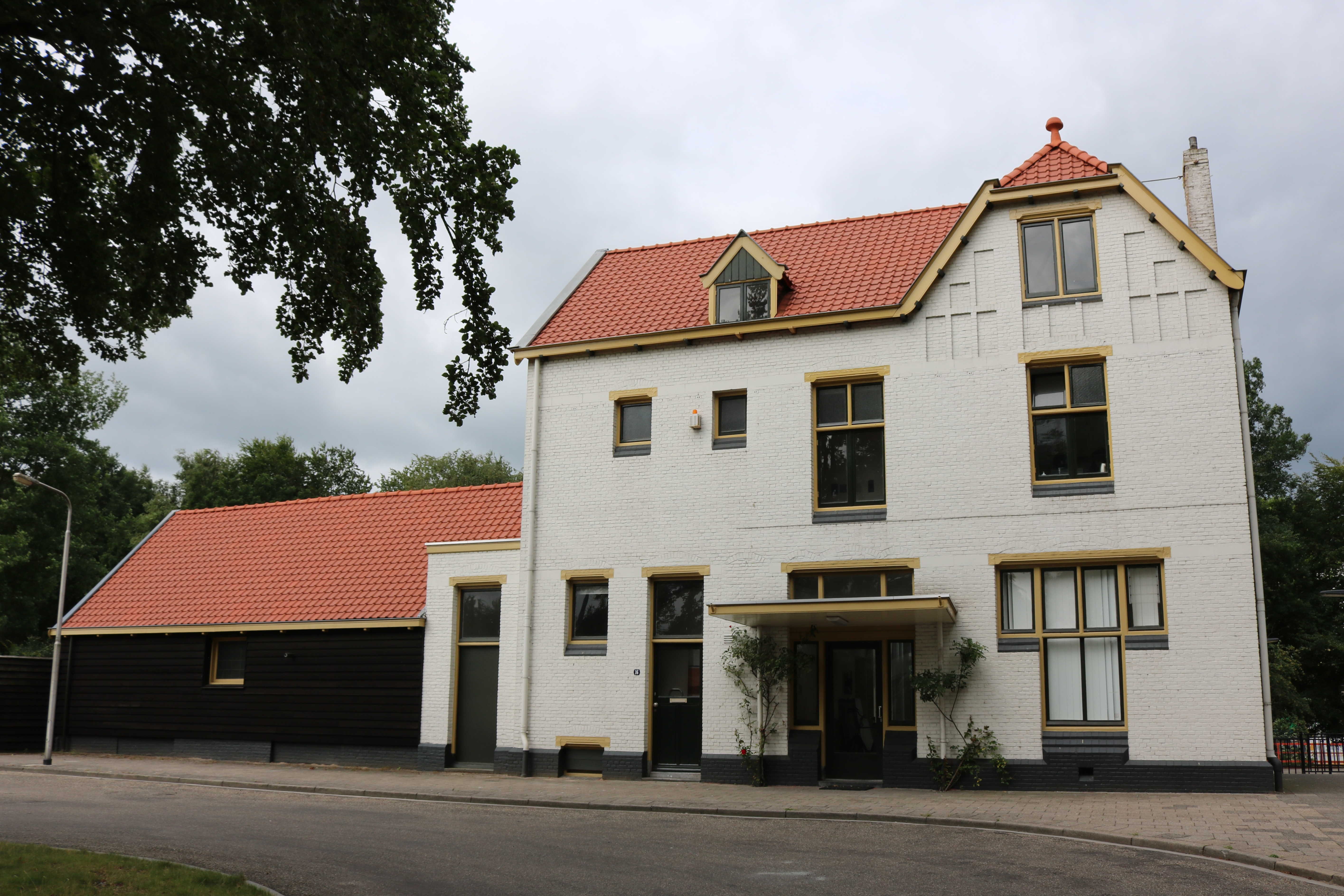 Station Vroomshoop (foto: Daniel van der Ree, 23 juni 2018)